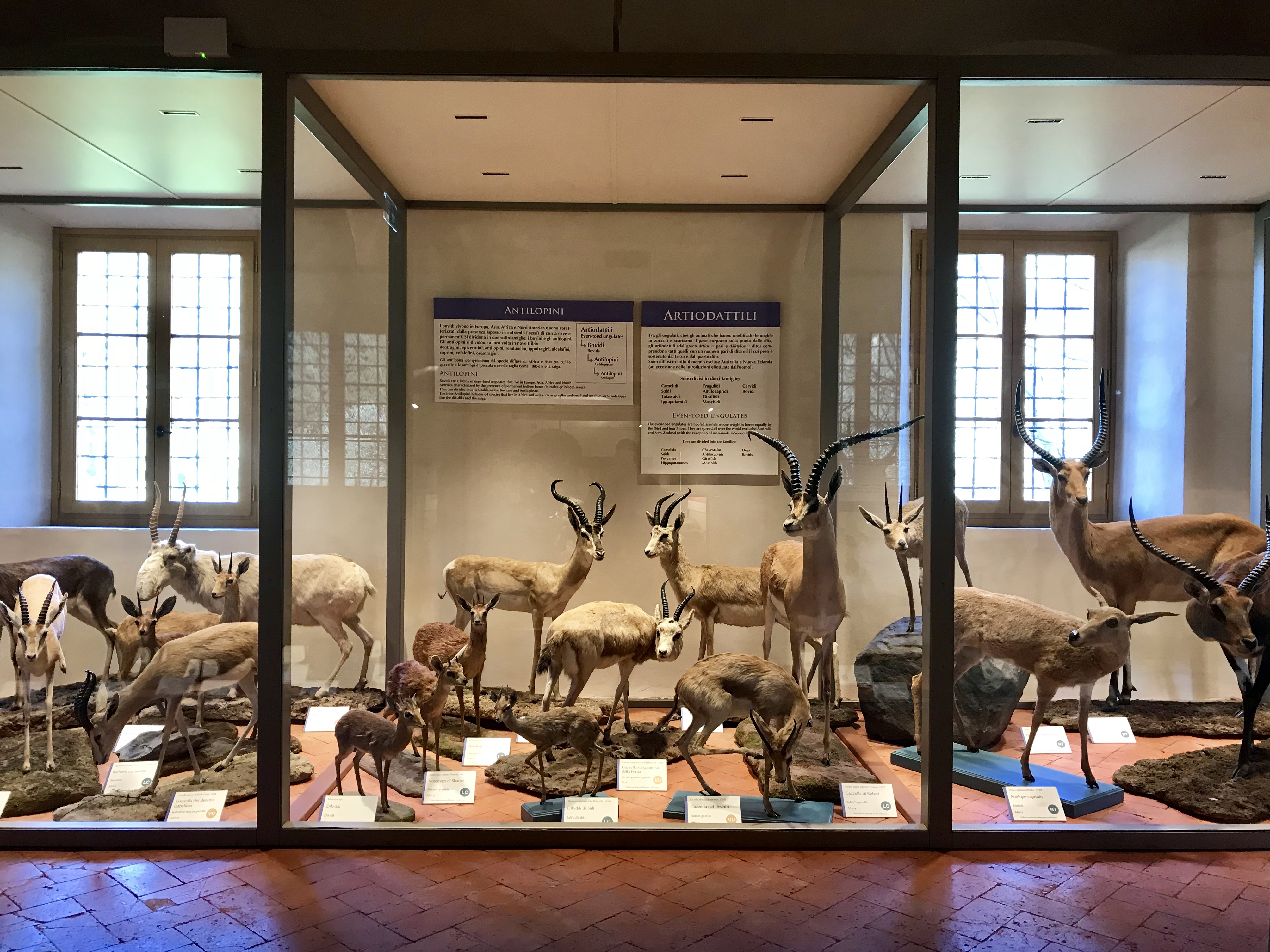 Parte della nuova galleria dei mammiferi al Museo di Storia Naturale dell'Università di Pisa.